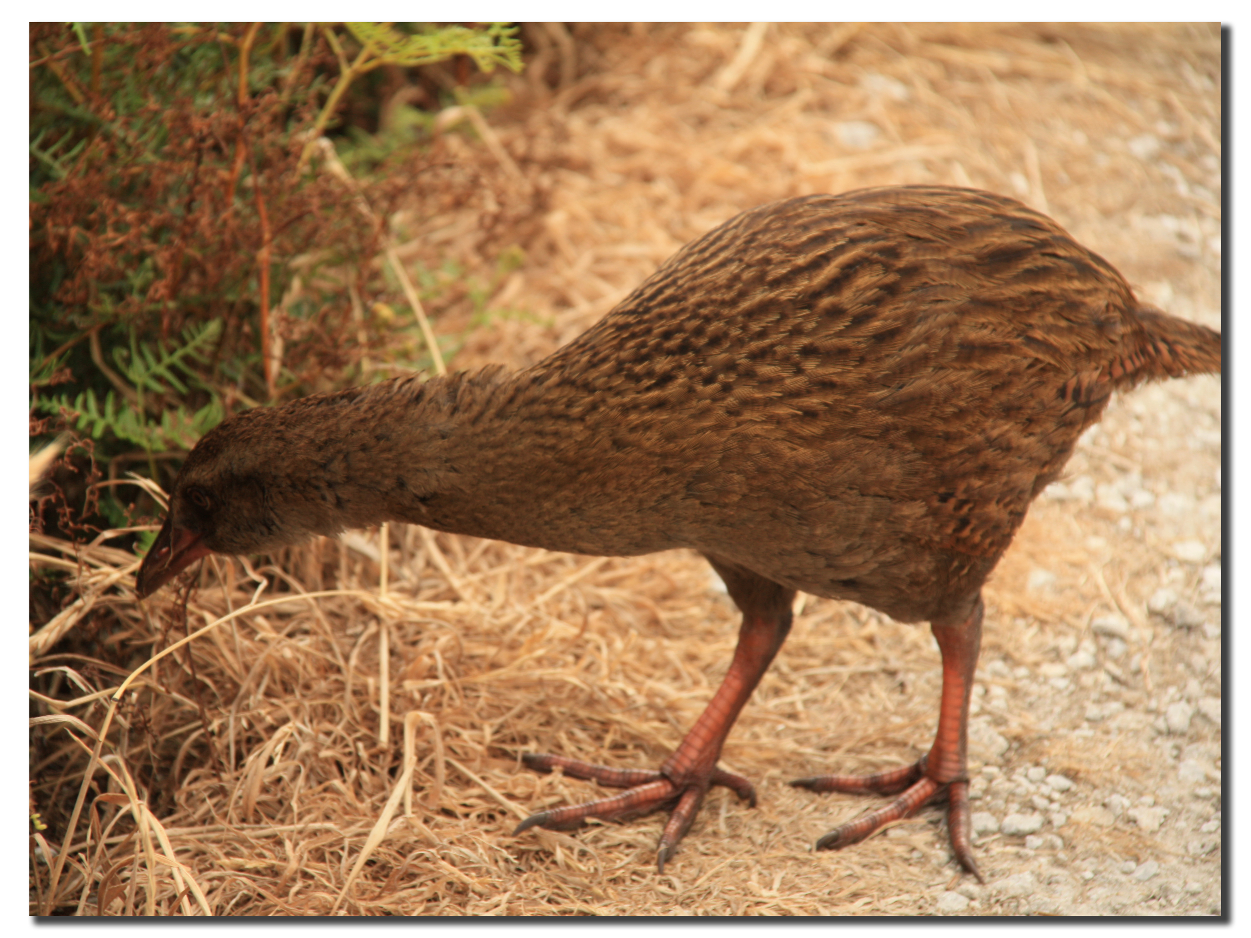 Weka (Gallirallus australis)